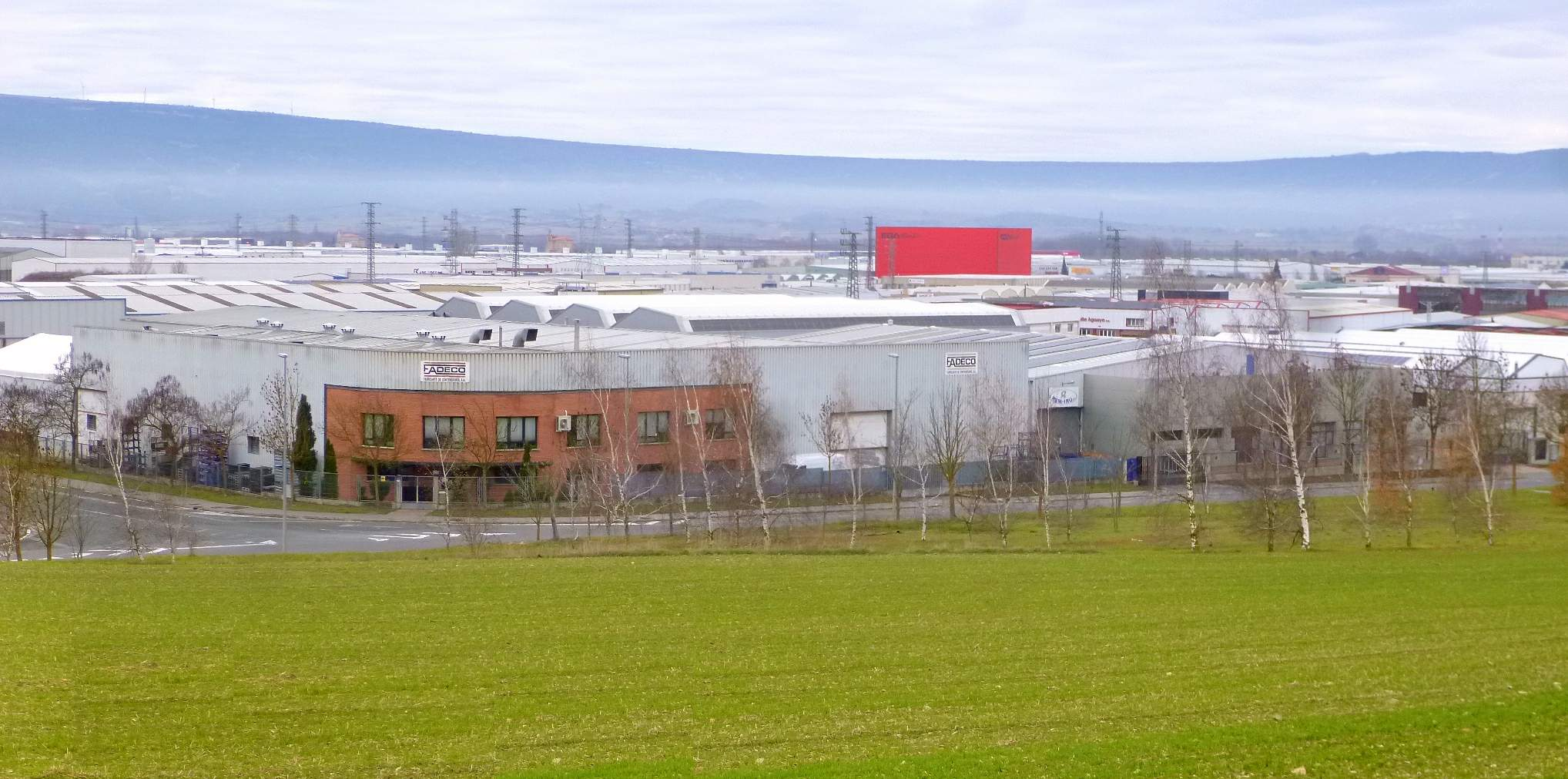 Parque Empresarial Jundiz (Vitoria)